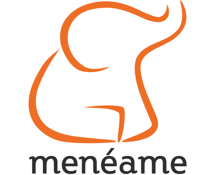 Menéame logo